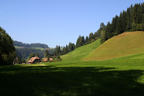 Bauernhof im Gohltal bei Stadelweid (Emmental)